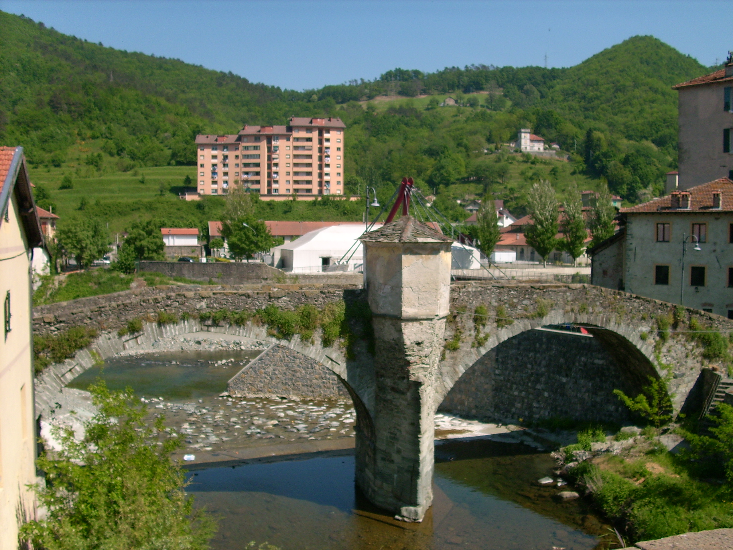 Ponte romano presso Rossiglione Inferiore, Liguria, Italia